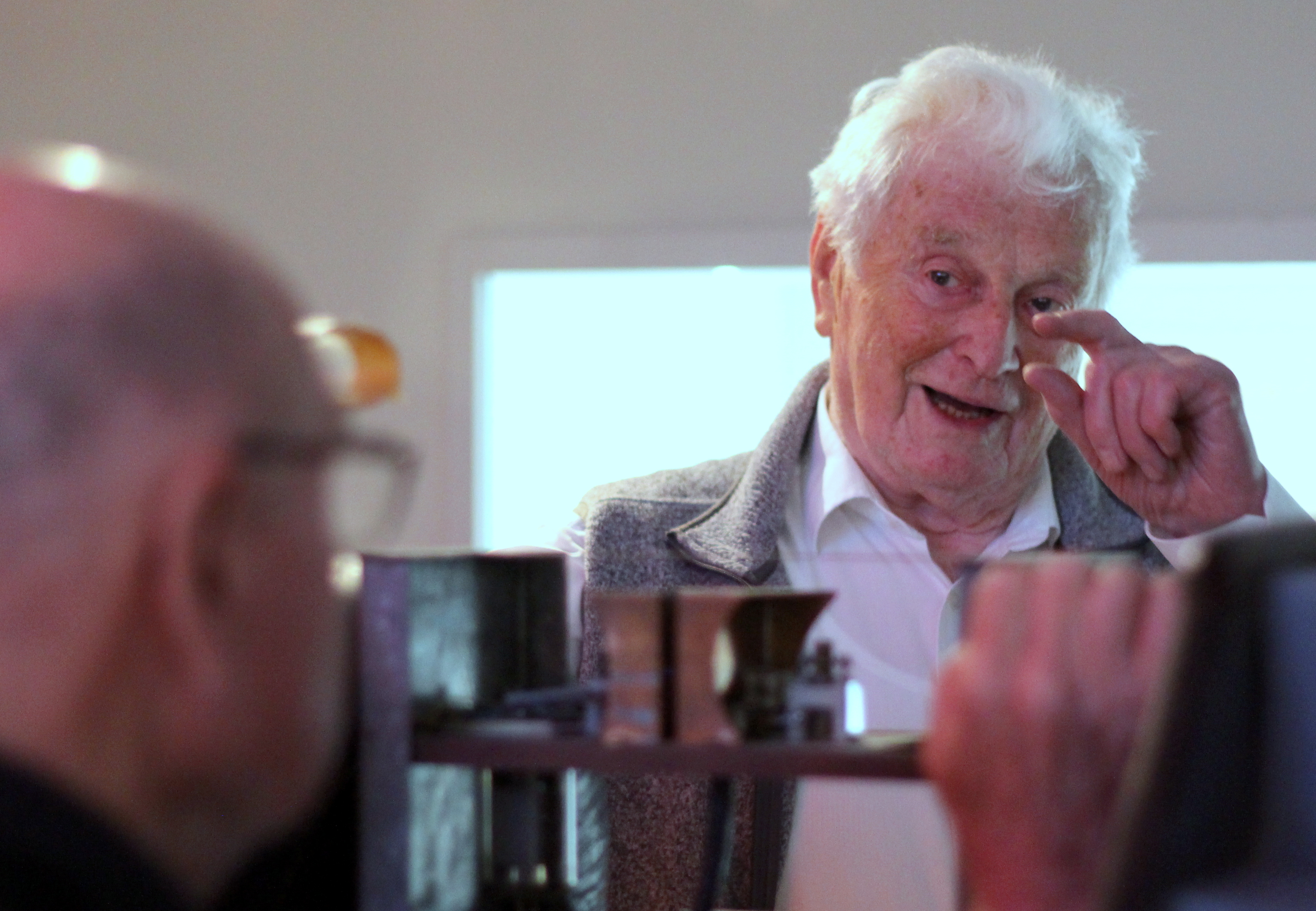 Deutsches Museum Bonn. GLAM. Karl-Heinz Althoff.